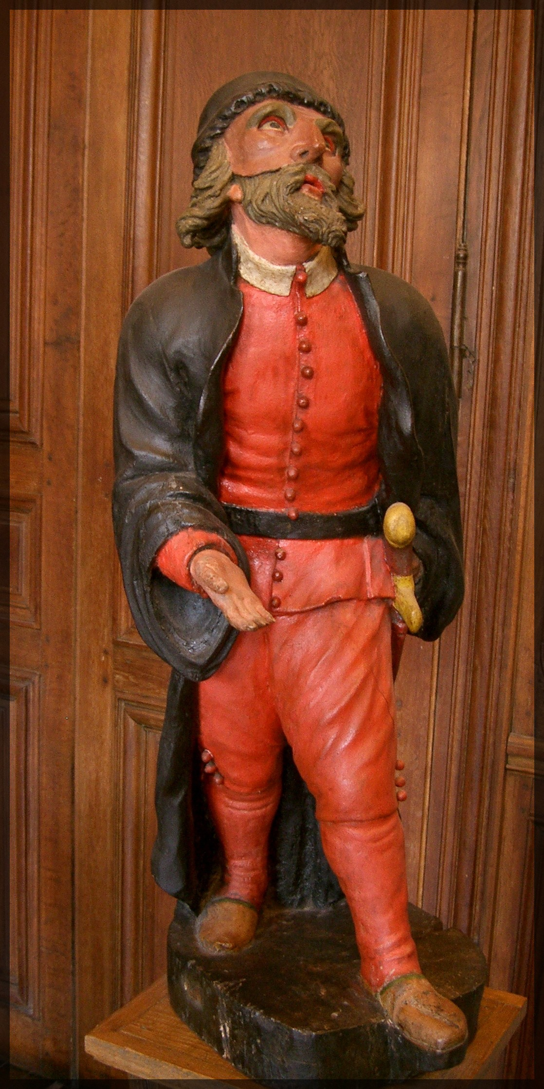 Personnage de la commedia dell'arte. Petite statue en plâtre peint (environ 100 cm) provenant du Théâtre Séraphin installé au Palais-Royal à la fin du XVIIIe siècle et conservée au musée Carnavalet à Paris (série de quatre pièces : Arlequin – Pantalone – Il Dottore – Brighella).